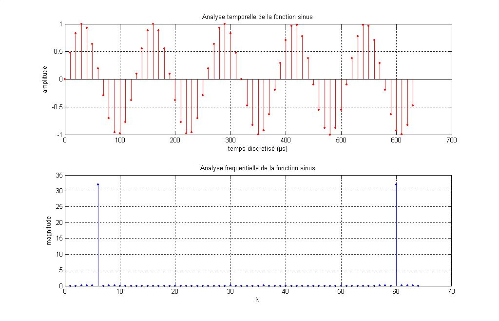 Exemple Transformée de Fourier Discrete